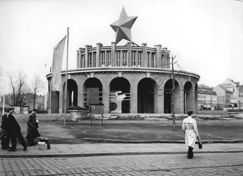 Chemnitz, Sowjetpavillon Zentralbild Schlegel 30.4.1956 Stadtansichten von Karl-Marx-Stadt Am 10.Mai 1956 werden die Teilnehmer an der Friedensfahrt Warschau-Berlin-Prag im Etappenort Karl-Marx-Stadt eintreffen. Dort wird auch der letzte Ruhetag für die "Giganten der Landstrasse" sein. UBz: Ein Blick auf den Sowjetpavillon in Karl-Marx-Stadt.